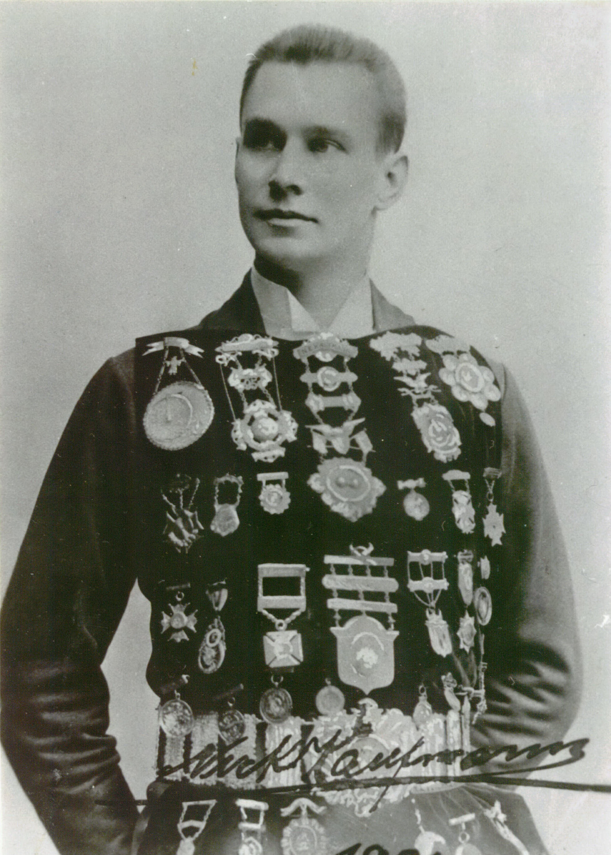 Nick Kaufmann, US-amerikanischer Trick-Radsportler